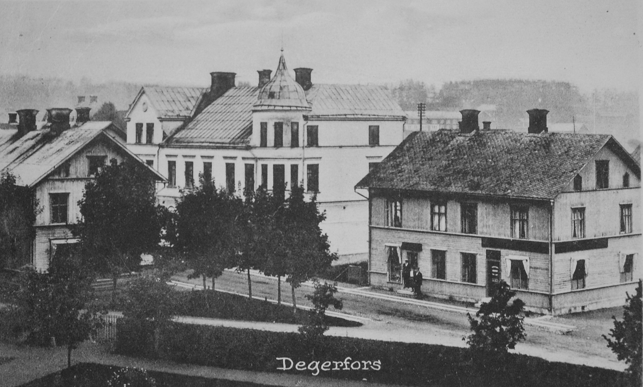 Degerfors